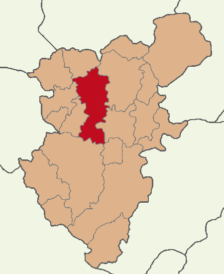 Pamukkale ilçesinin konumu